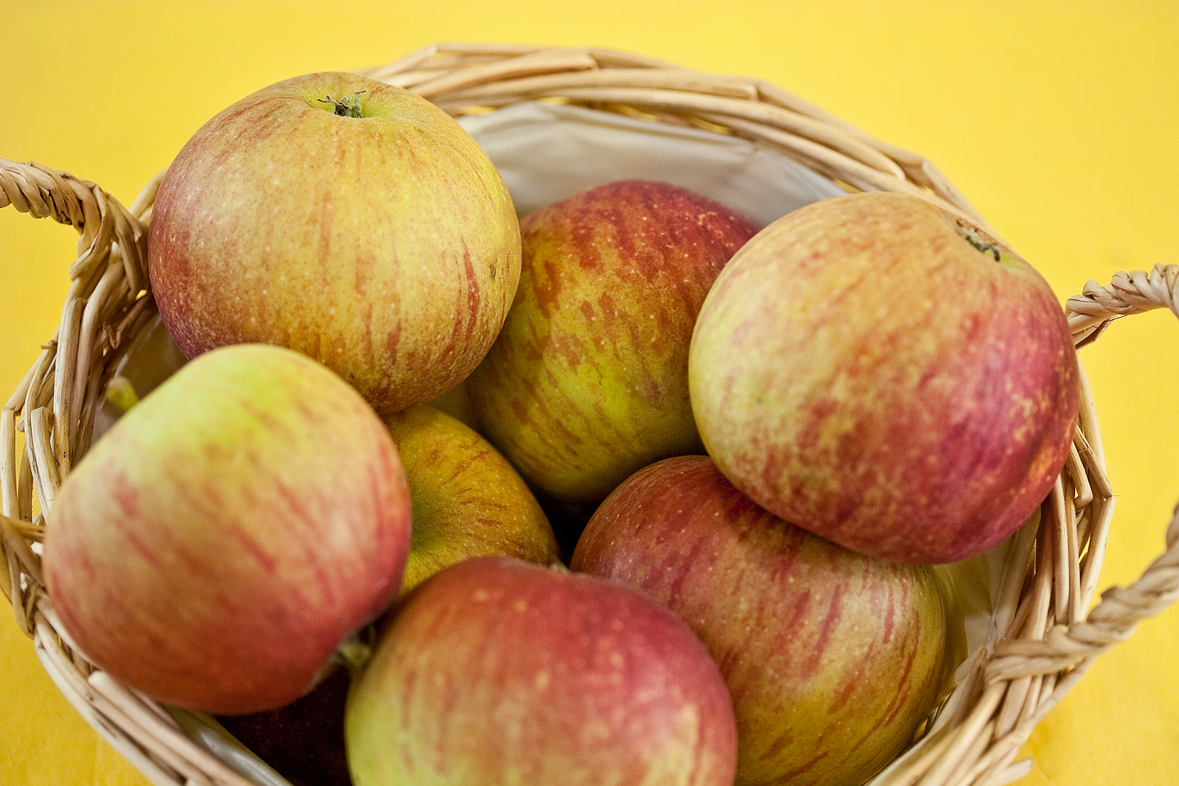 Der Fiesta ist eine Apfelsorte